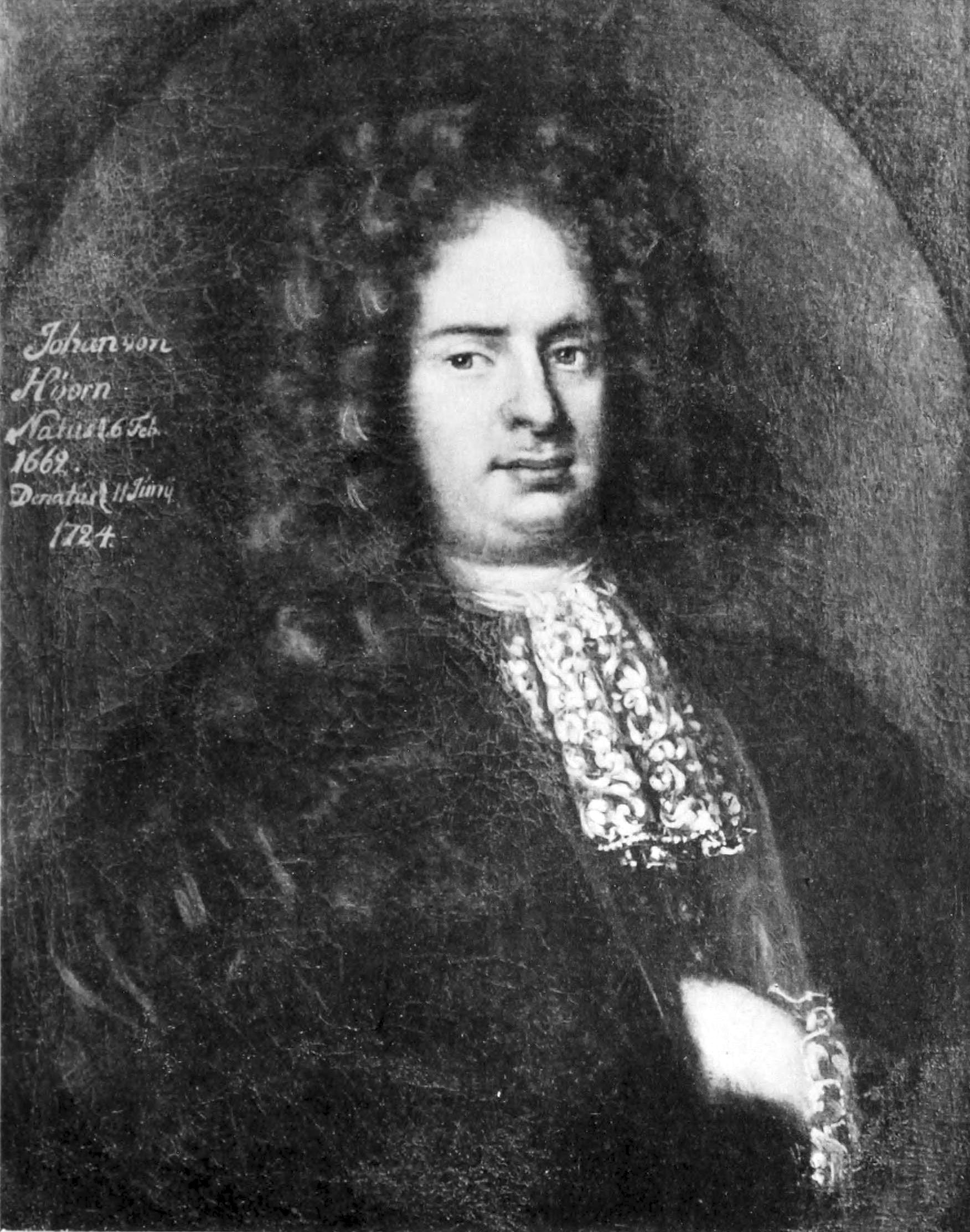 Johan von Hoorn (1662-1724). Medelålders man, bröstbild, fas t. v., venstra handen stucken innanför kappan, med mörka blågrå ögon, mörka ögonbryn, mörk brungrå allongeperuk nedhängande långt öfver axlarna, hvit lindad halsduk med nedhängande breda spetsändar, spetsmanschetter, gyllenduksrock knäppt med kupiga förgyllda knappar, svartviolett kappa med rödt foder. Mörkgrå bakgrund i oval fönsteröppning, t. h. står Johan von Hoorn. Natus 16 Feb. 1662. Denatus d. 11 Junii 1724. Olja på duk, 76x60 ctm., af David von Krafft, från början af 1700-talet. Medicinalstyrelsen. Eich. o 26. Hahr: D. v. Krafft o 181.